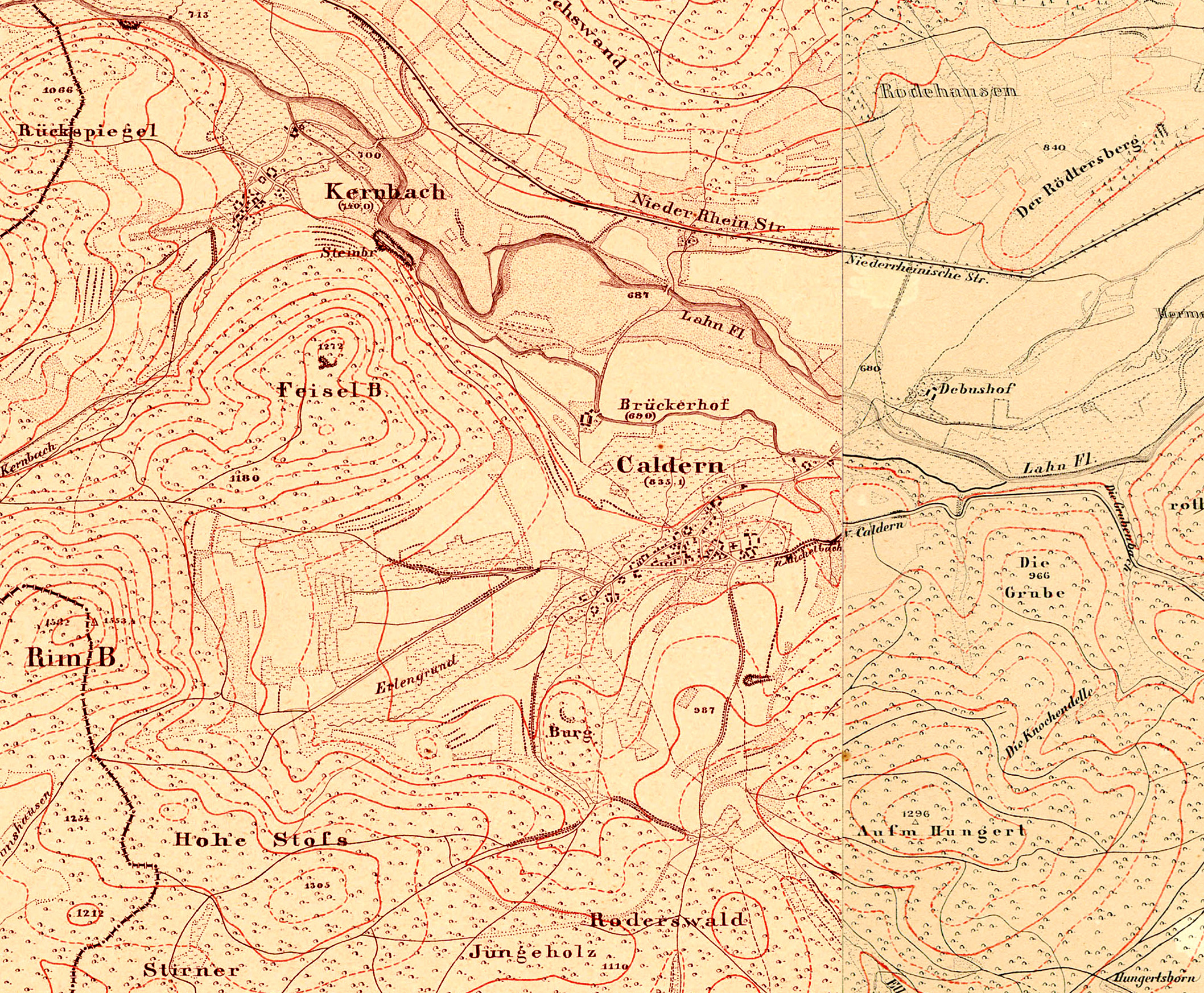 Topografische Karte von Caldern (1:25000).